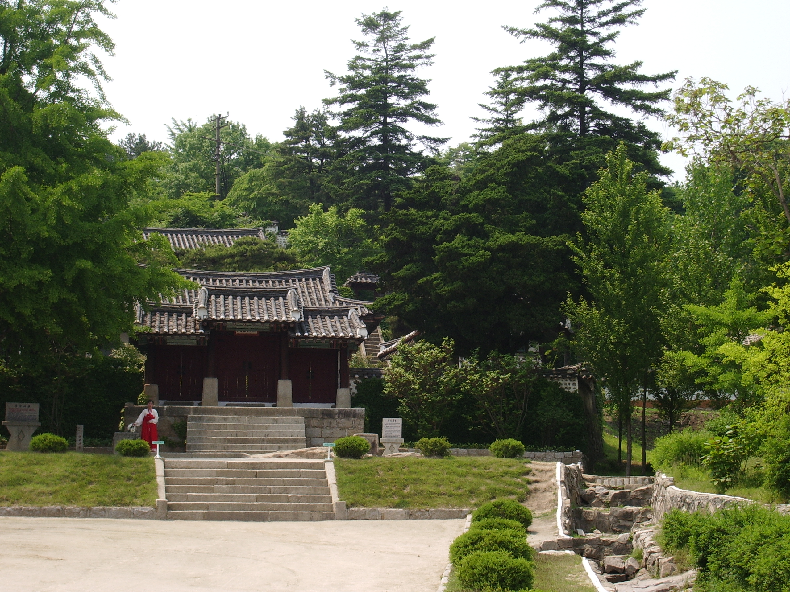 개성 숭양사원 정면입니다.